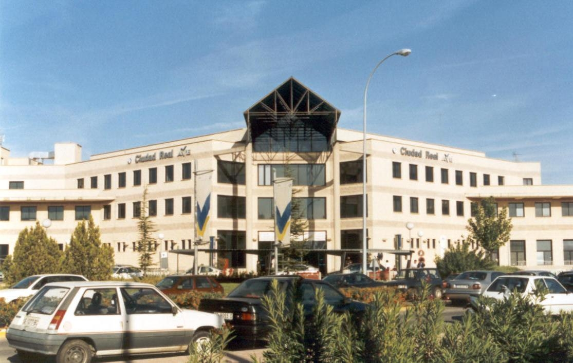 Estación del AVE en Ciudad Real. Autor: Fev. Octubre 2002.